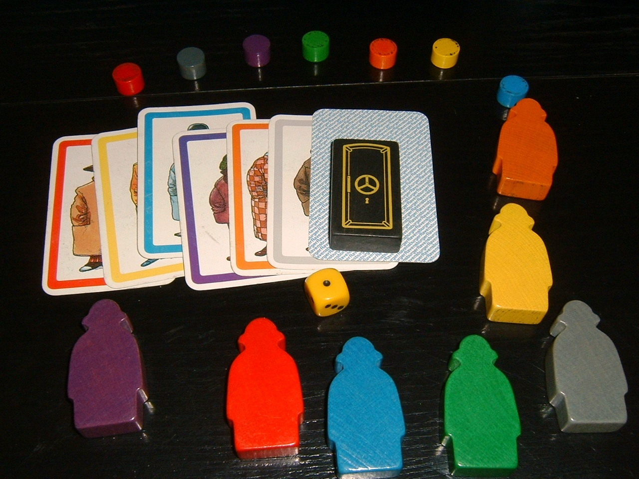 Zubehör (Karten , Spielfiguren) des Spiels Heimlich & Co.